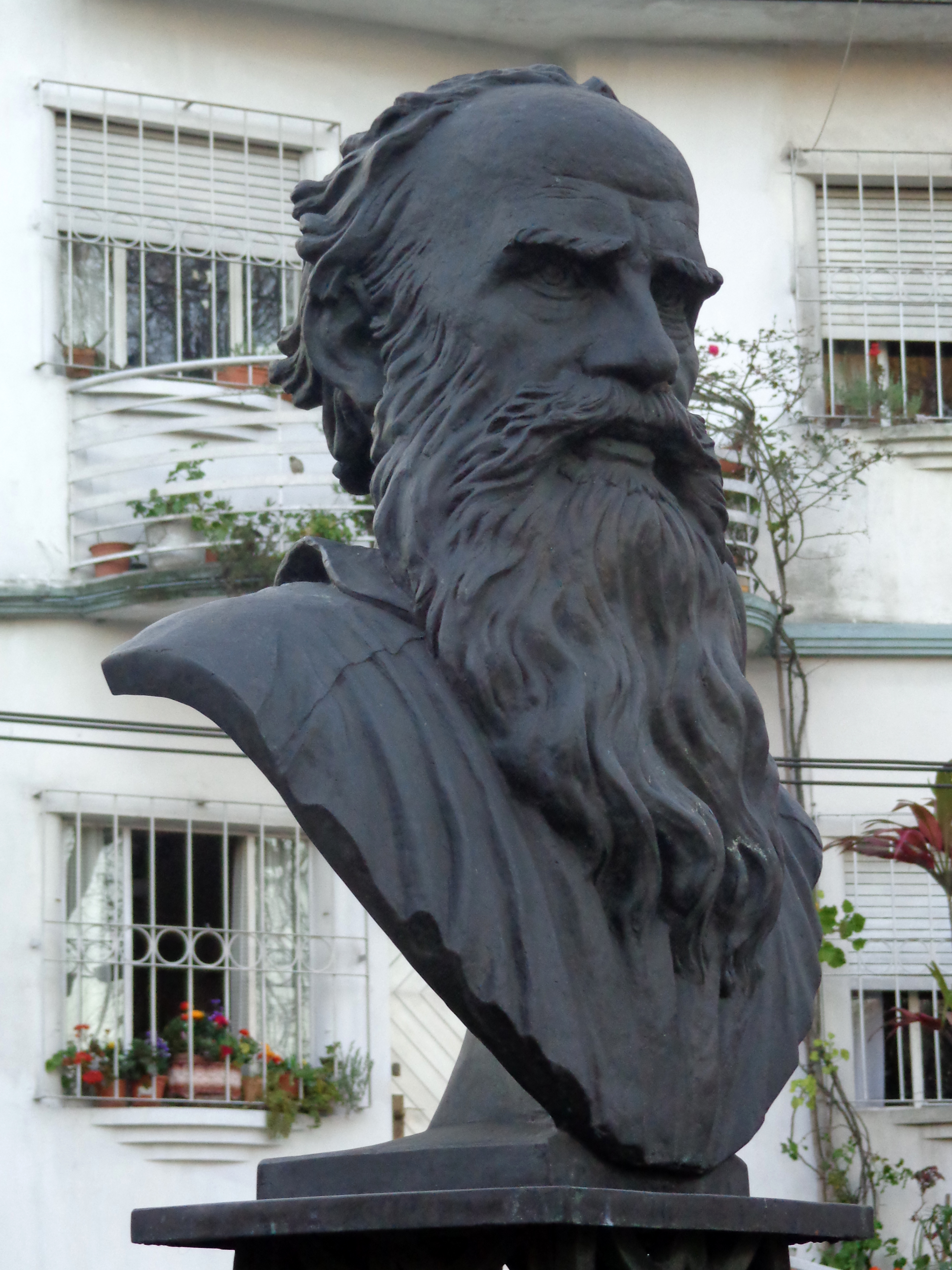 León Tolstoi (busto). Ubicada en el departamento de Montevideo